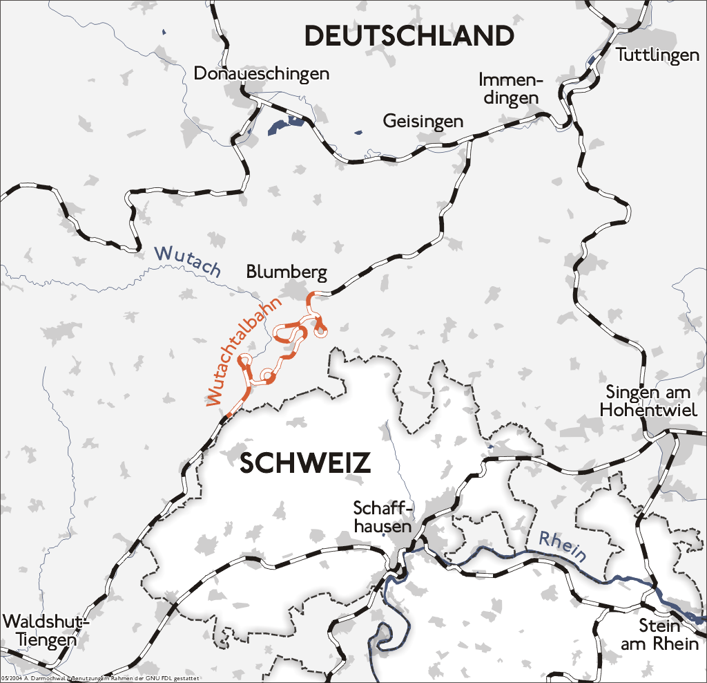 Darstellung zeigt die Lage der Wutachtalbahn. Zeichnung erstellt 2004 von Benutzer:Sansculotte. Bild ist unter der Creative Commons Share Alike zur weiteren Verwendung freigegeben. Quellenangabe und Beleg an erbeten.